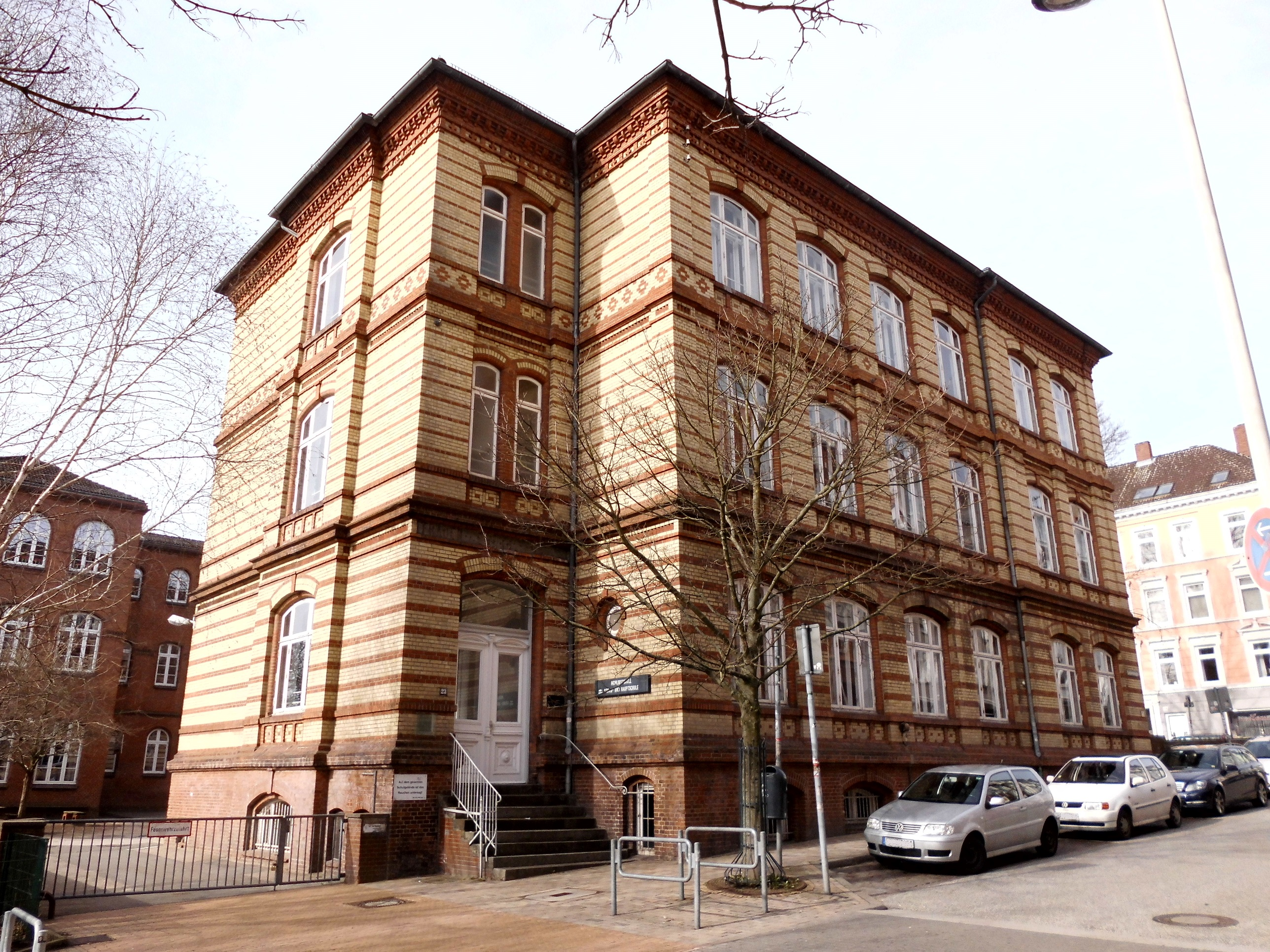 Legienstraße 23 im Kieler Stadtteil Damperhof.